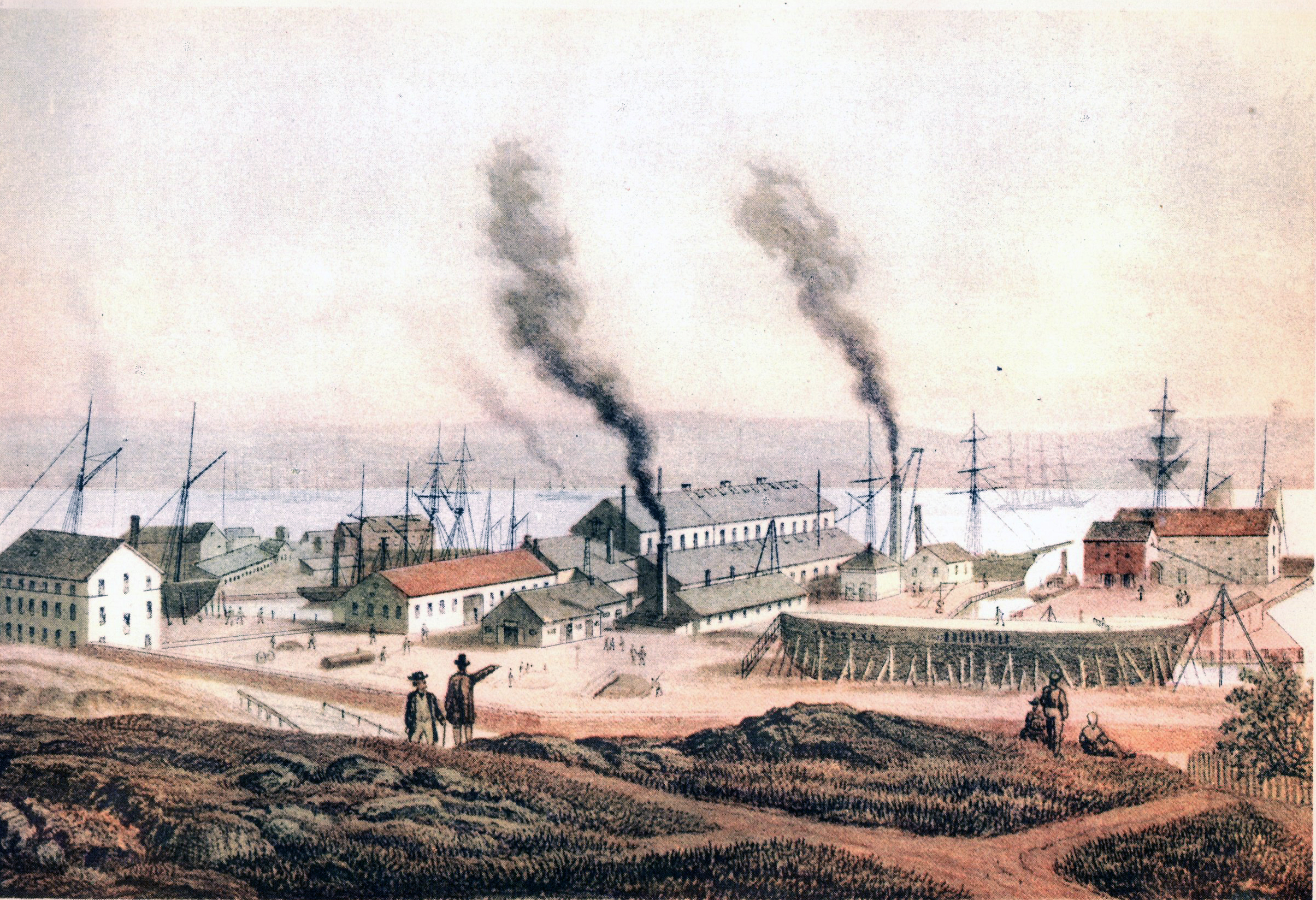 Lindholmens varv. Litografi ur serien »Sveriges industriella etablissementer»